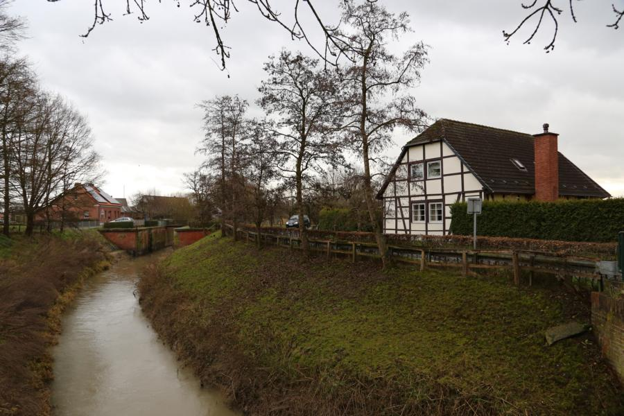 Die kleine Schleuse an der Kesseler Mühle wurde in der ersten Hälfte des 19. Jahrhunderts erbaut und gegen Ende des Jahres 1828 in Betrieb genommen. Sie diente im Verbund mit 11 anderen Schleusen ähnlicher Bauart dazu, die Lippe zwischen Lippstadt und Wesel schiffbar zu machen.